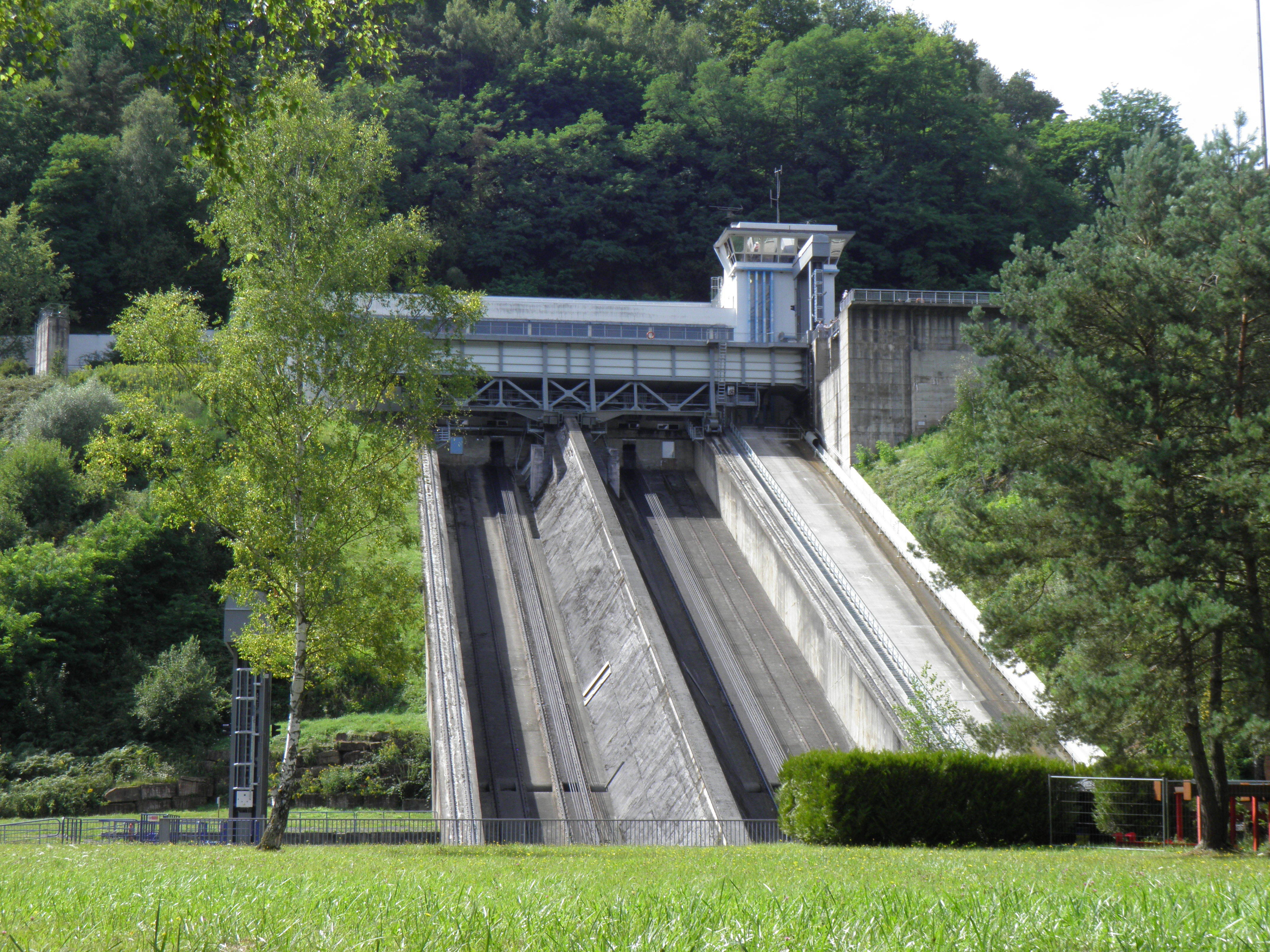 Plan incliné à Saint-Louis (Moselle, France).